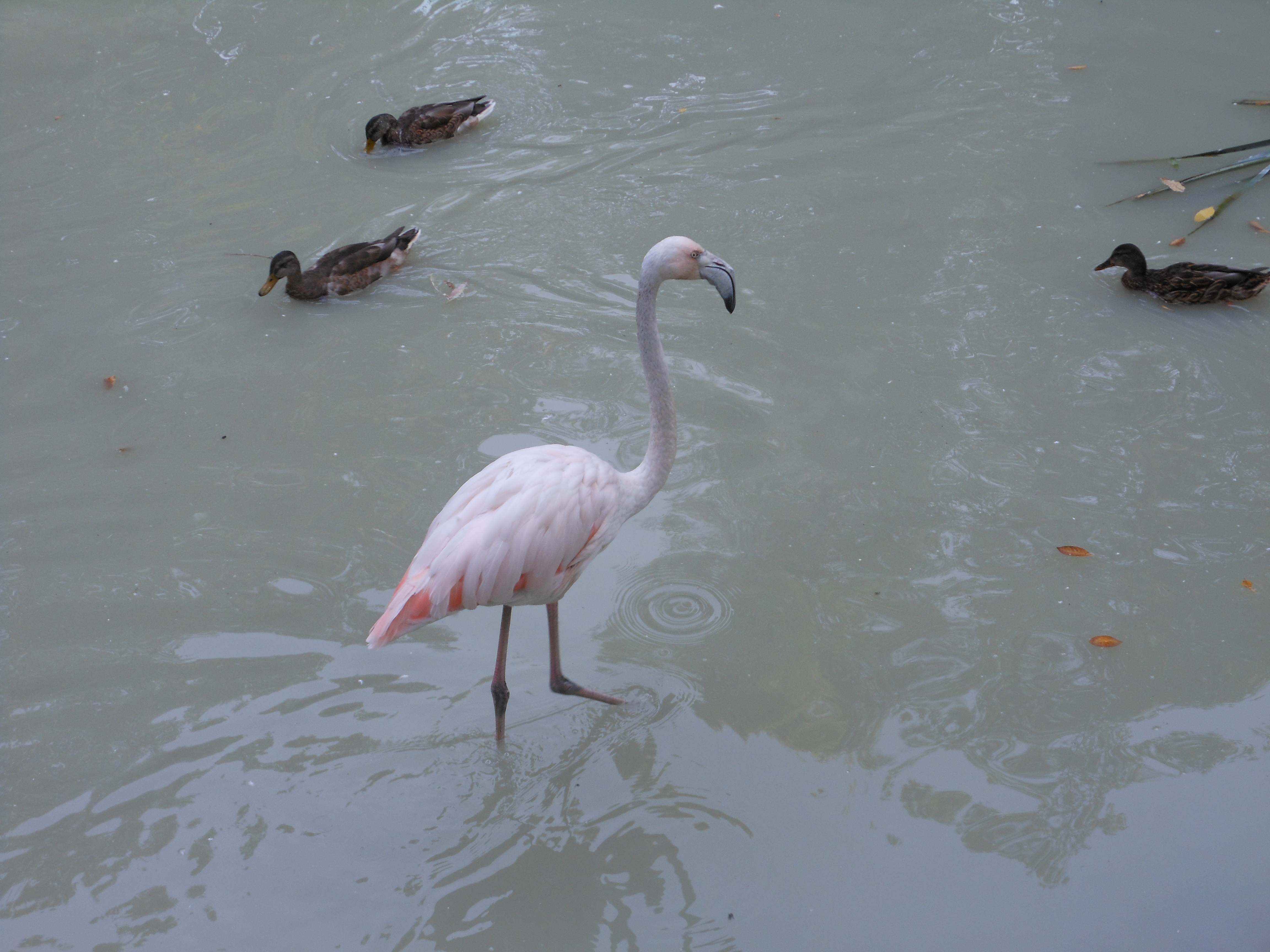 Київський зоопарк, Шевченківський район